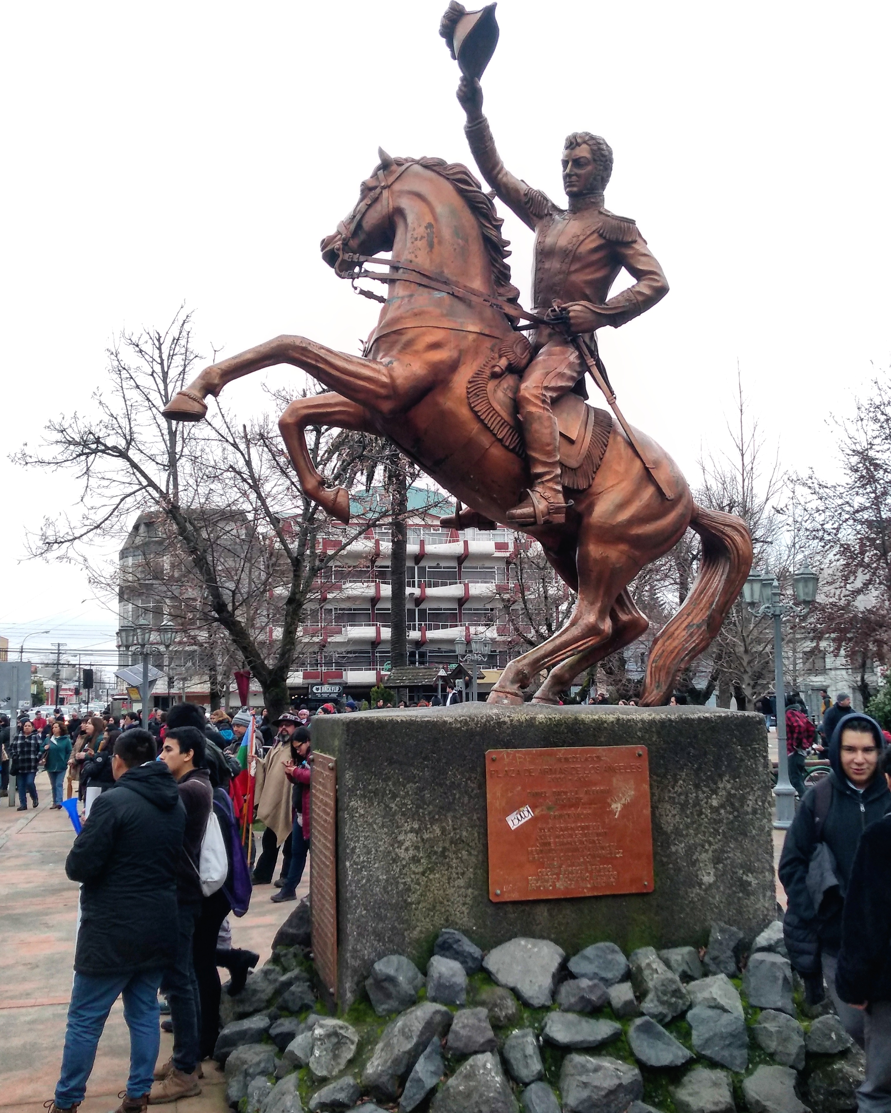 Monumento ecuestre a Bernardo O'Higgins en la Plaza de Armas de Los Ángeles, Biobío. Primer alcalde de la ciudad.